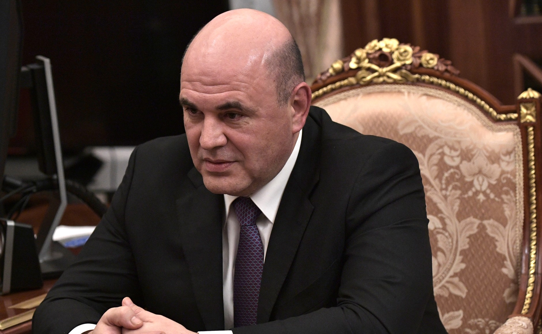 Президент внёс кандидатуру Михаила Мишустина на должность Председателя Правительства